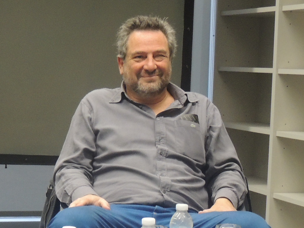 Daniel Guebel durante una charla en el Centro Cultural de la Ciencia.